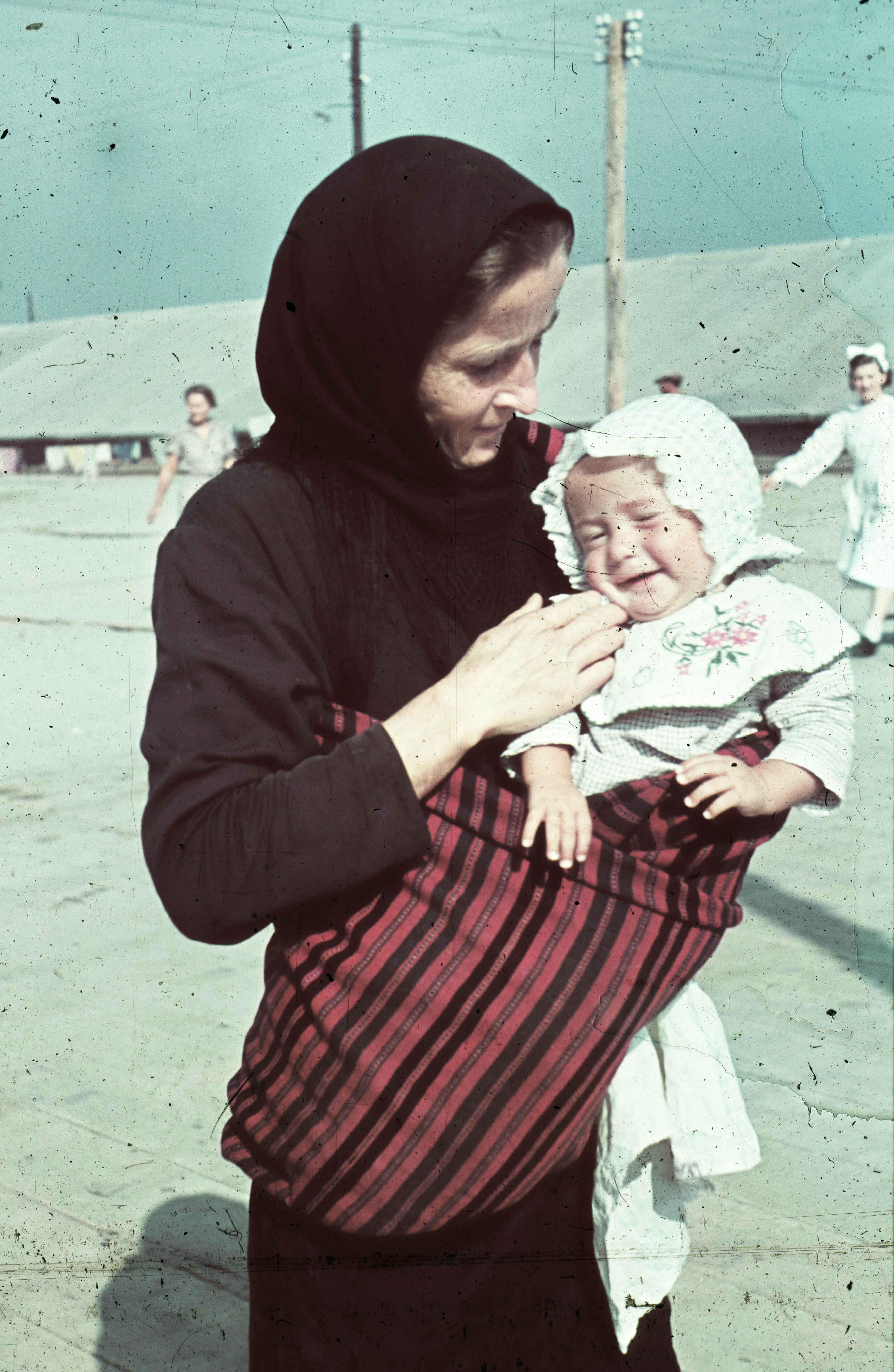 a Besszarábiából menekített német nemzetiségűek átmeneti tábora. Location: Serbia, Belgrade Tags: refugee, colorful Title: a Besszarábiából menekített német nemzetiségűek átmeneti tábora.